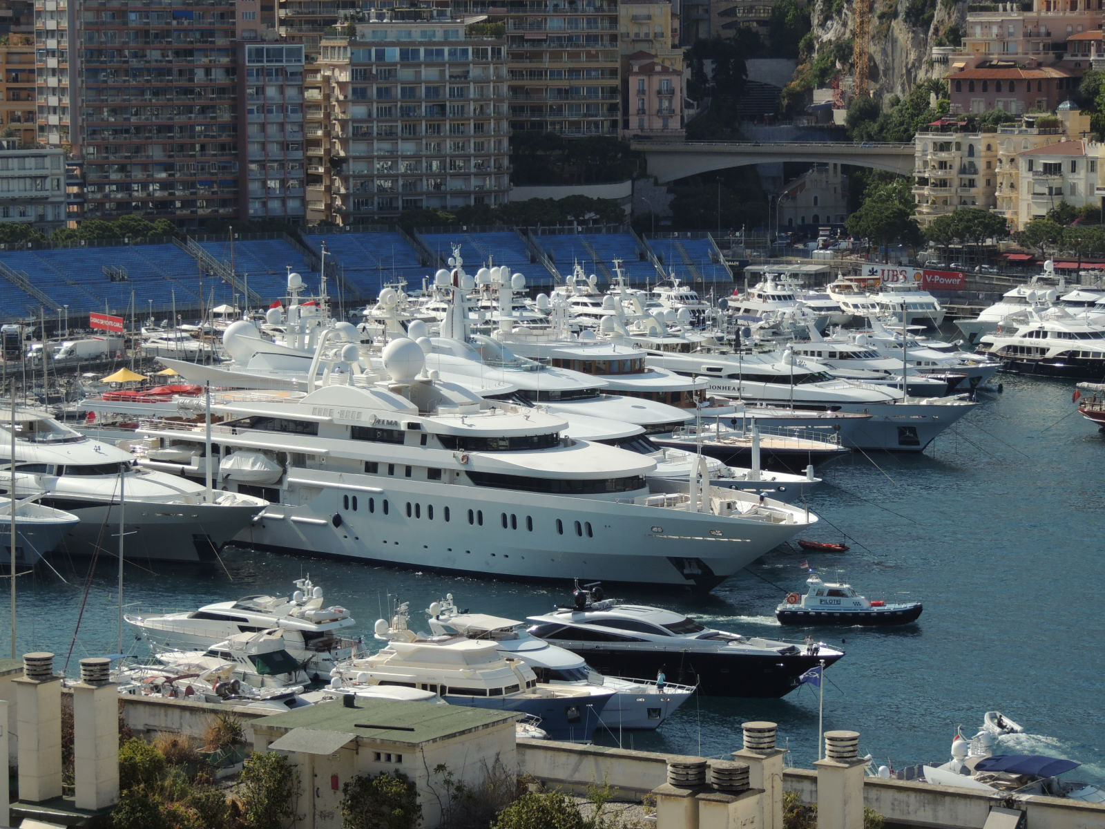 port de monaco